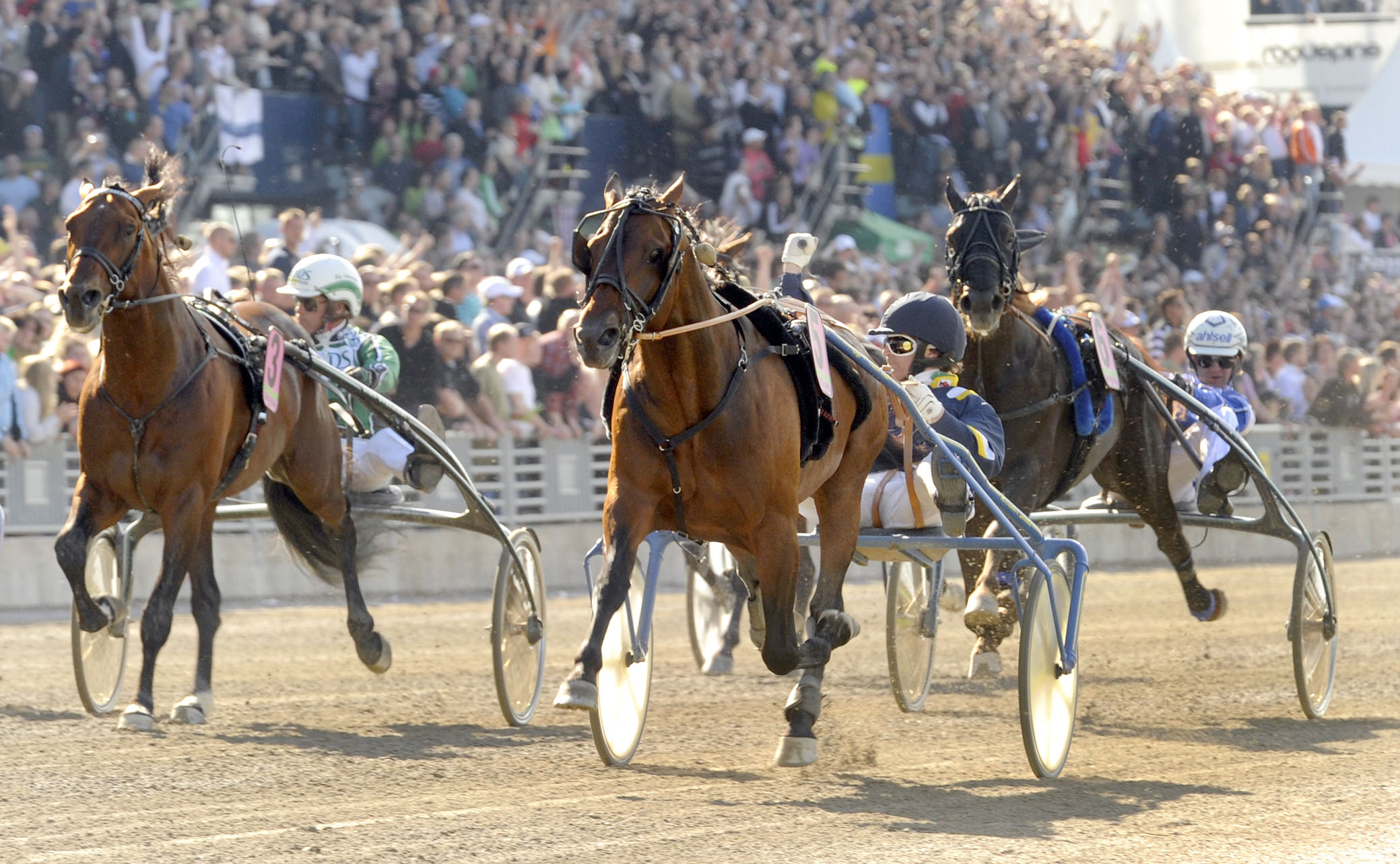 Johnny Takter (5) vinner Elitloppet 2010 på Solvalla med Iceland.